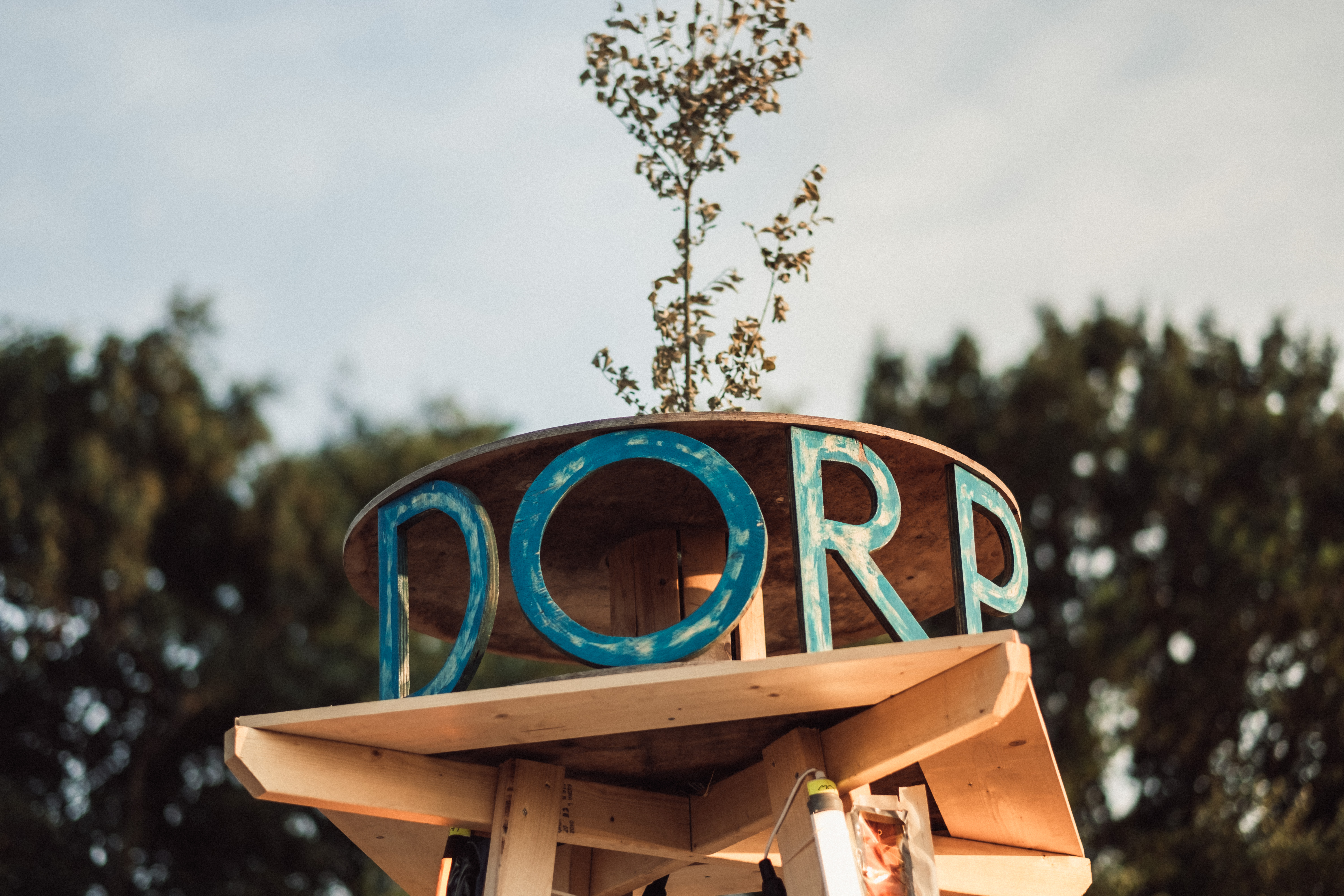 Dorp